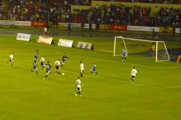 Messi y sus amigos, ciudad de Panamá.